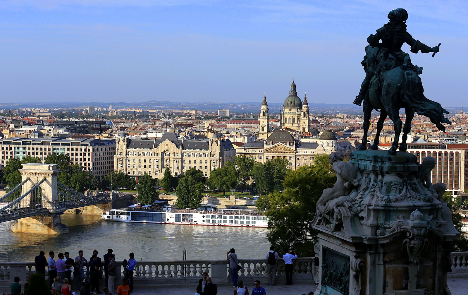 Kilátás a Budai Várból